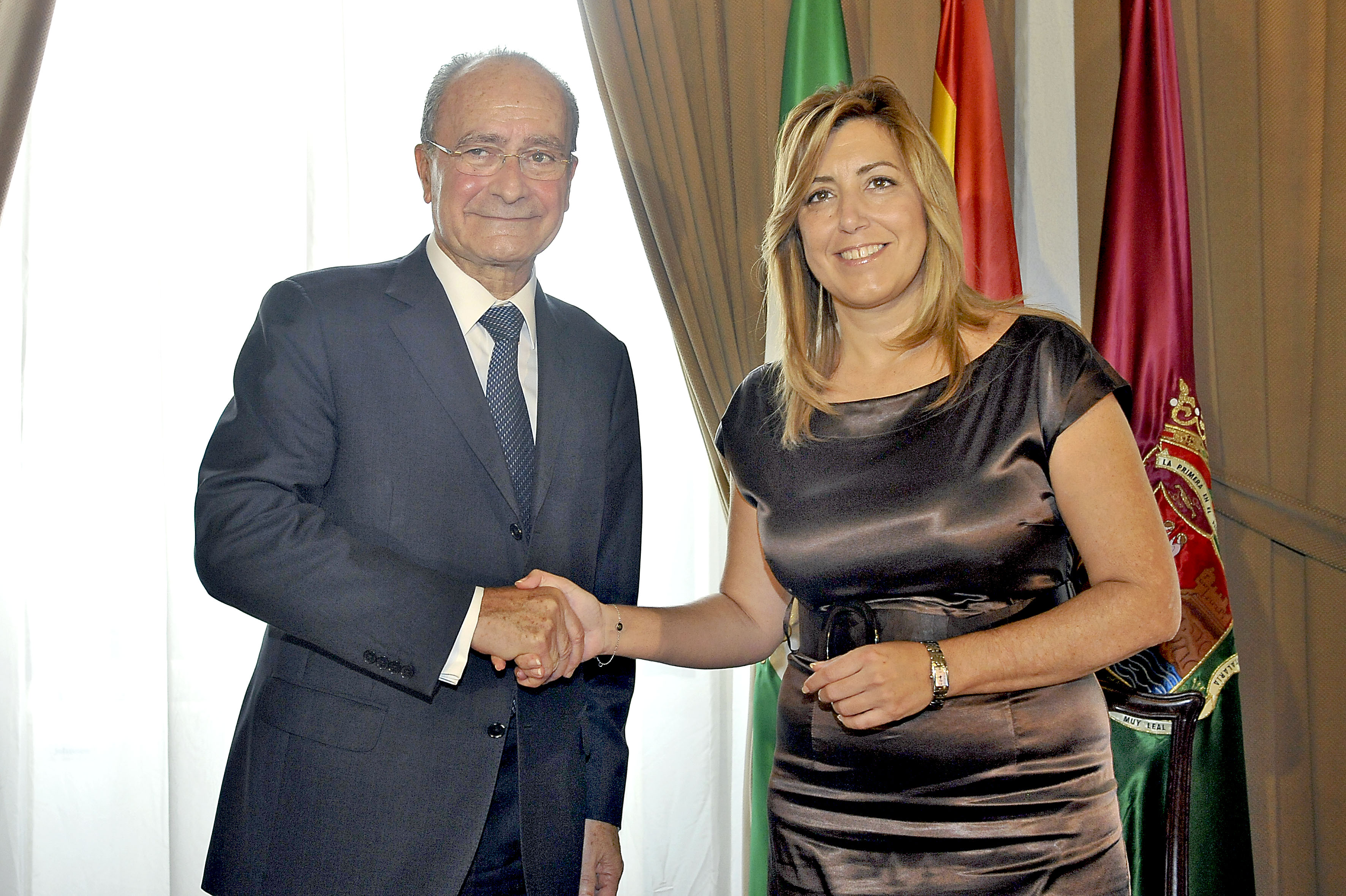 Francisco de la Torre Prados y Susana Díaz